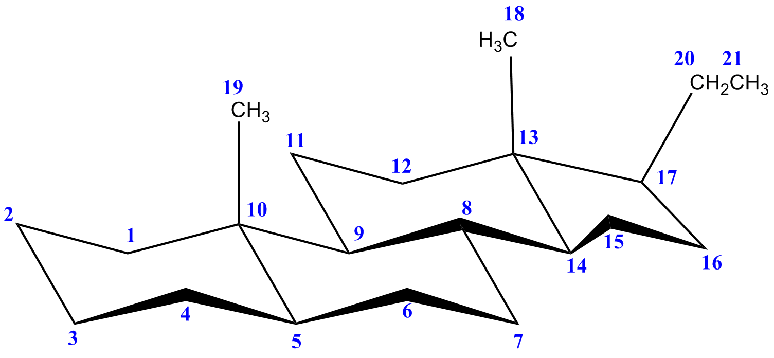 estructura tridimensional del pregnano